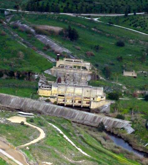 מפעל החשמל בנהרים. צילום אוויר לכיוון מזרח. רישיון נוצר על ידי משתמש:אסף.צ